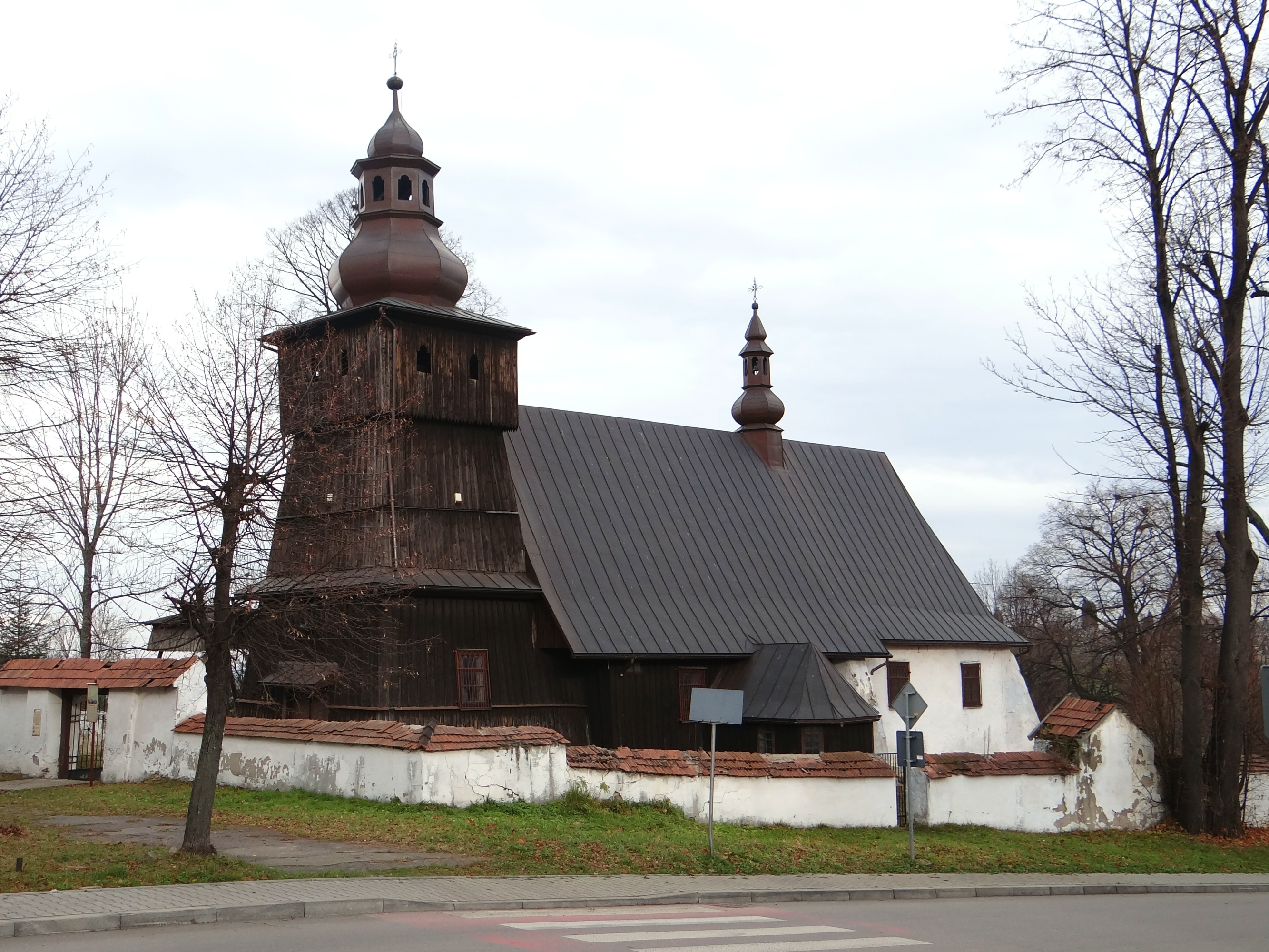 Zabytkowy kościół w Skrzydlnej